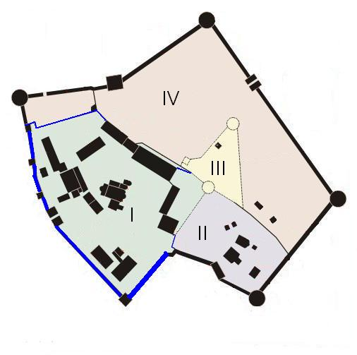 Стены Успенского монастыря на плане